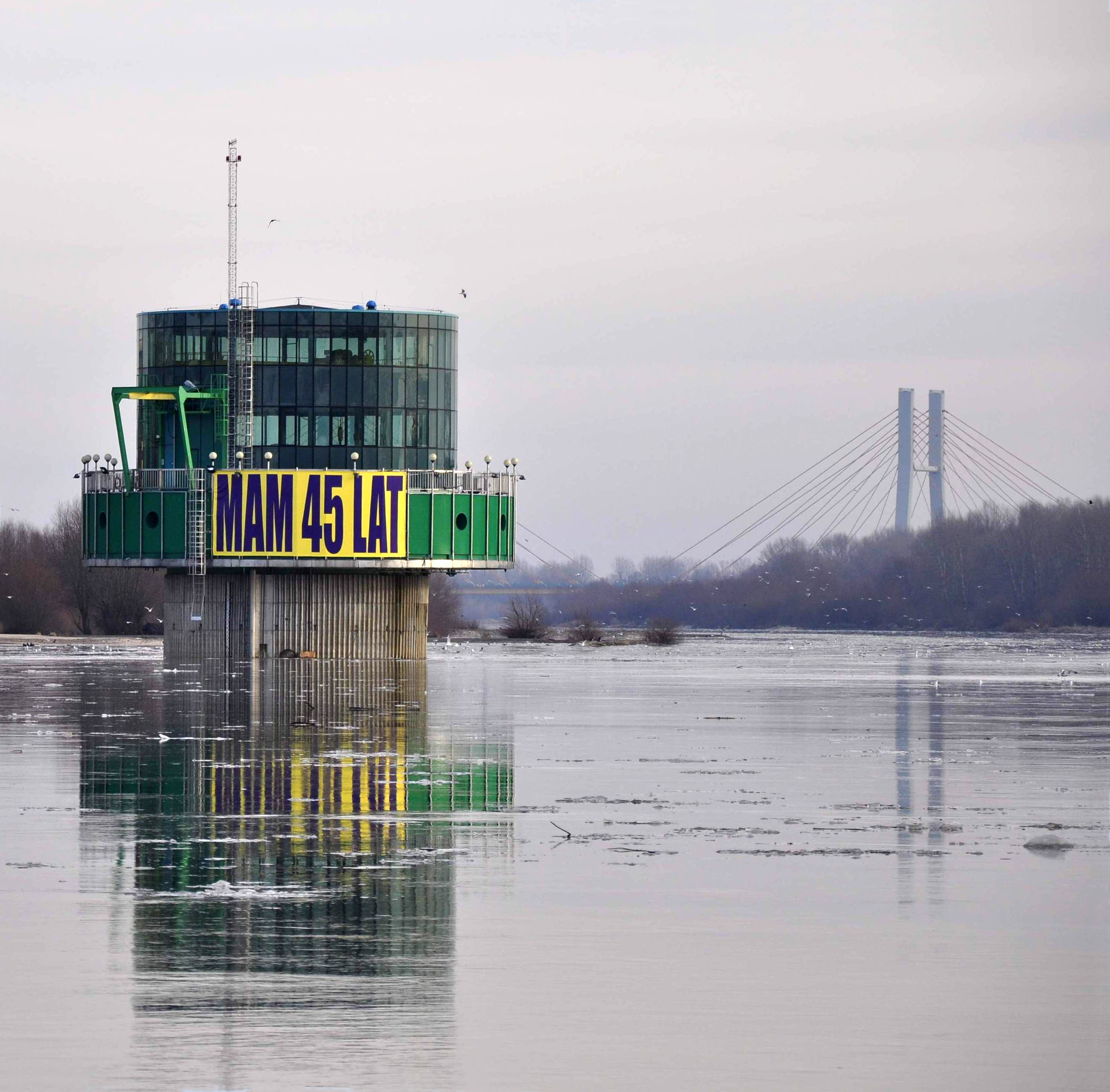 Warschau, Weichsel, Filterturm